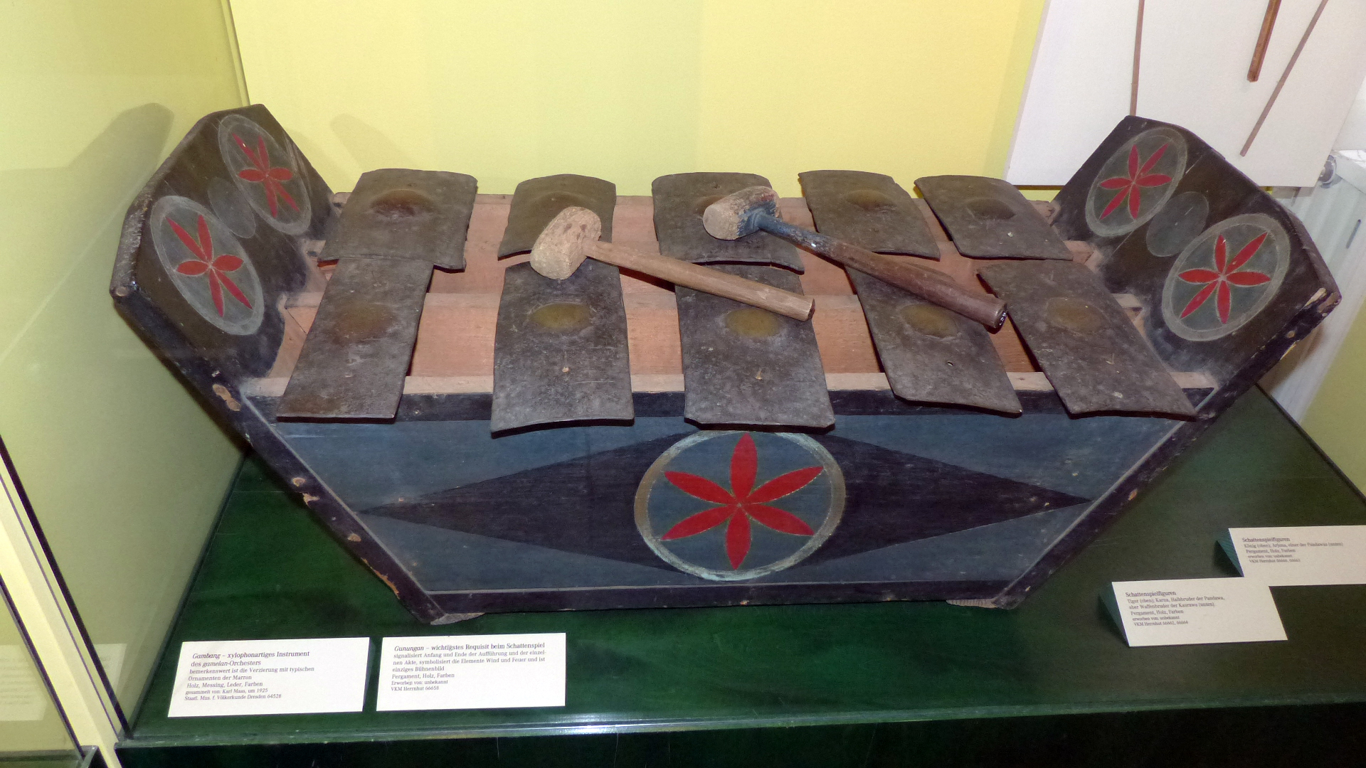 Gambang, xylophonartiges Instrument eines Gamelan-Orchesters; Exponat im Völkerkundemuseum in Herrnhut (Sachsen)